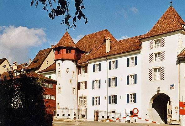 Delémont: Porte de Porrentruy mit dem roten Turm